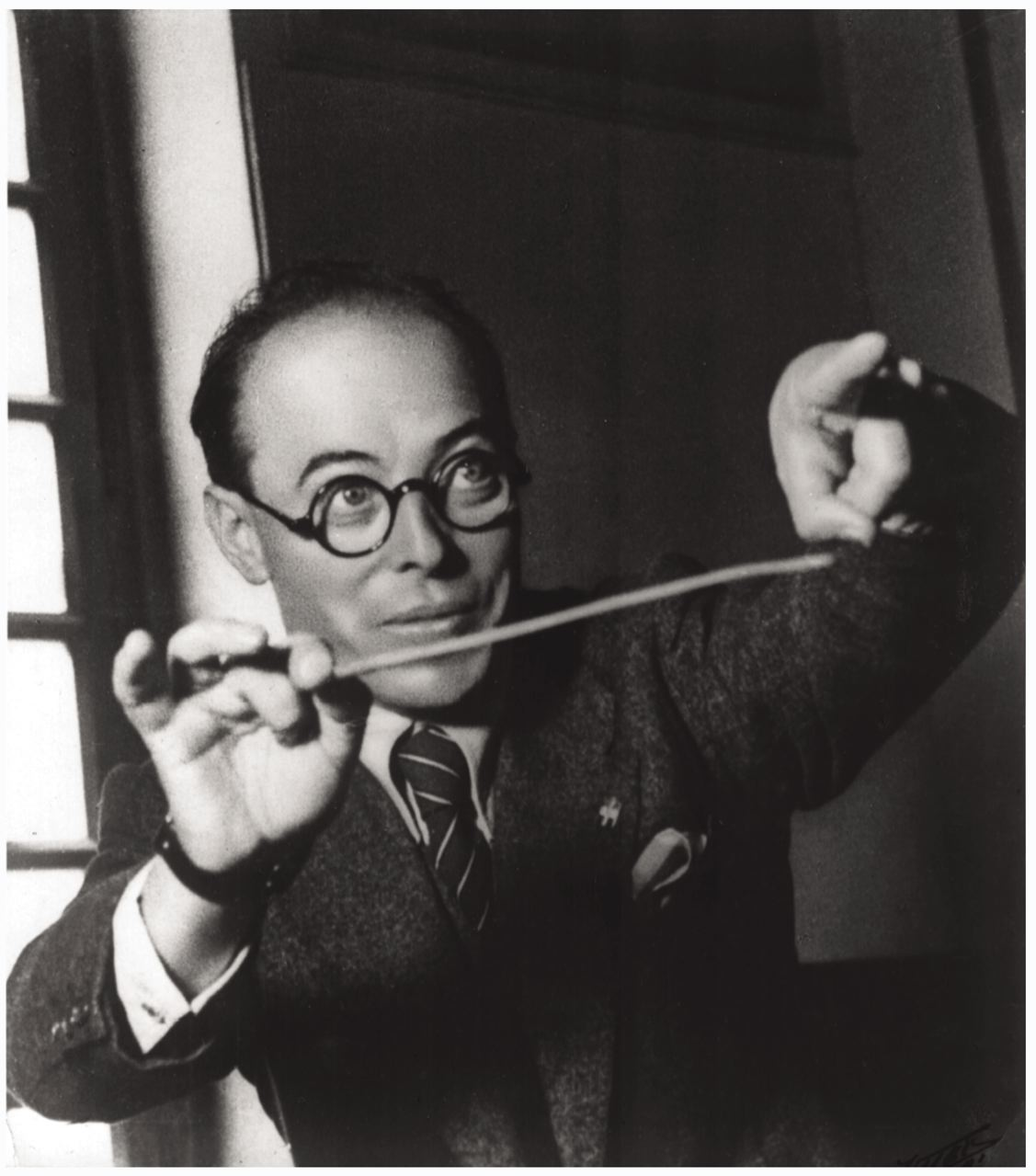 Il direttore d'orchestra Pippo Barzizza con la bacchetta in mano